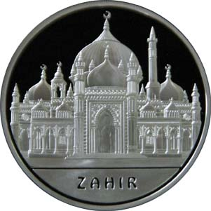 Памятная монета Республики Казахстан - Серия "Знаменитые мечети мира" - 100 тенге - Реверс - Серебро